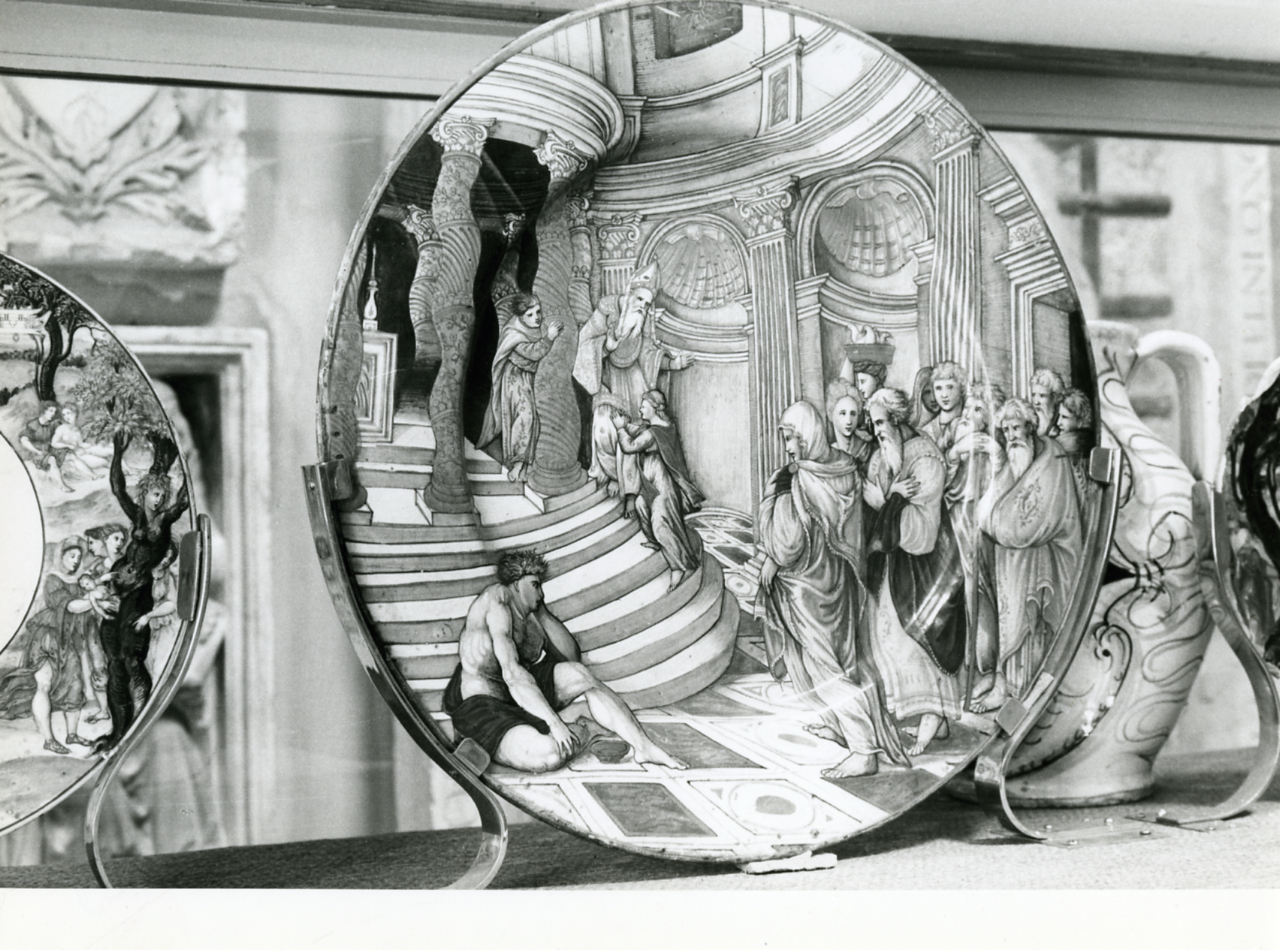 Servizio fotografico : Bologna, 1971 / Paolo Monti. - Stampe: 3 : Positivo b/n, gelatina bromuro d'argento/ carta, 24x30. - ((Al verso delle stampe manoscritti i numeri dei negativi corrispondenti (formato 35 mm) con indicazione del fotogramma: 1632/25, 1651/35, 1656/23; iscrizioni didascaliche manoscritte a matita; timbro a inchiostro con copyright (Corso Sempione - Milano). - Sul coperchio della scatola iscrizione didascalica manoscritta a pennarello nero: "Pittura". - Occasione: Documentazione per la mostra (e pubblicazione): Emiliani Andrea (a cura di), "La conservazione come pubblico servizio", Bologna, Edizioni Alfa, 1972. - Fonte: Agenda di Paolo Monti: Leica 1501-3000 Controllo numerazione (1950-1978), presso Archivio Paolo Monti. - Fonte: Fattura di Paolo Monti: IV. Commesse/ Fattura n. 25/ Riprese fotografiche per Mostra attività Soprintendenza La conservazione come pubblico servizio (1971/09/07), presso Archivio Paolo Monti. 345 riprese fotografiche di oggetti, quadri, affreschi, attività di restauro di ogni tipo di opere e di materiali, metodi di conservazione nell'ambito del territorio. - Fonte: Monografia di Emiliani, Andrea (a cura di): La conservazione come pubblico servizio: ipotesi per un piano di tutela, intervento e riqualificazione dei beni artistici e culturali mobili delle provincie di Bologna, Ferrara, Forlì e Ravenna: 1971-1975, Bologna, Edizioni Alfa (1971)